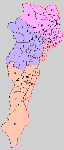 富山県西礪波郡の町村。